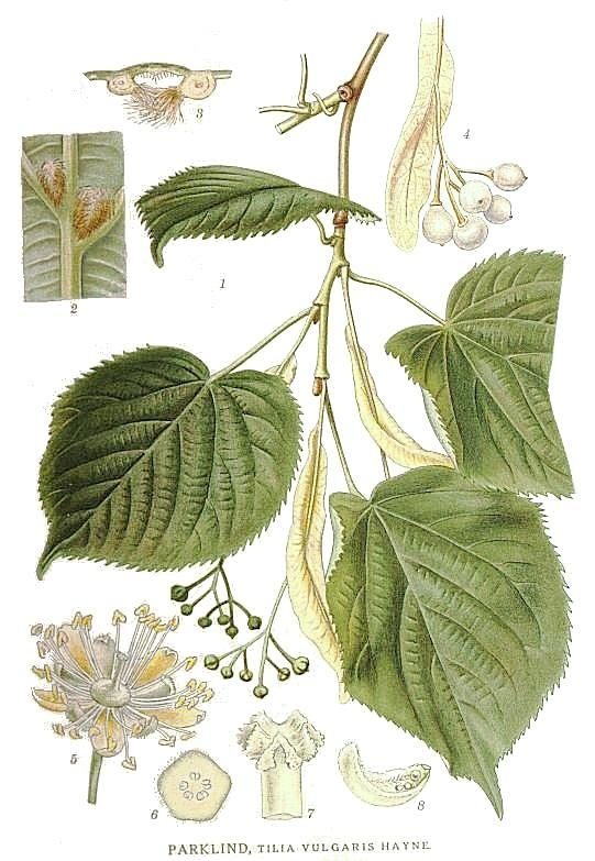 Tilia × europaea L., syn. Tilia × vulgaris Hayne Original Description Parklind, Tilia vulgaris Hayne